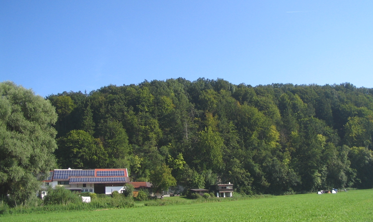 Neustadt an der Donau Ortsteil Weiler Haderfleck